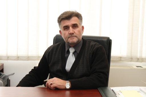 Dr. Fahrudin Ebibi - Dekan i Fakultetit të Shkencave Islame të Maqedonis